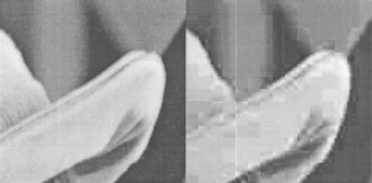 Lena efecto bloque